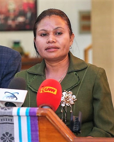 Armanda Berta dos Santos tritt vor die Presse.